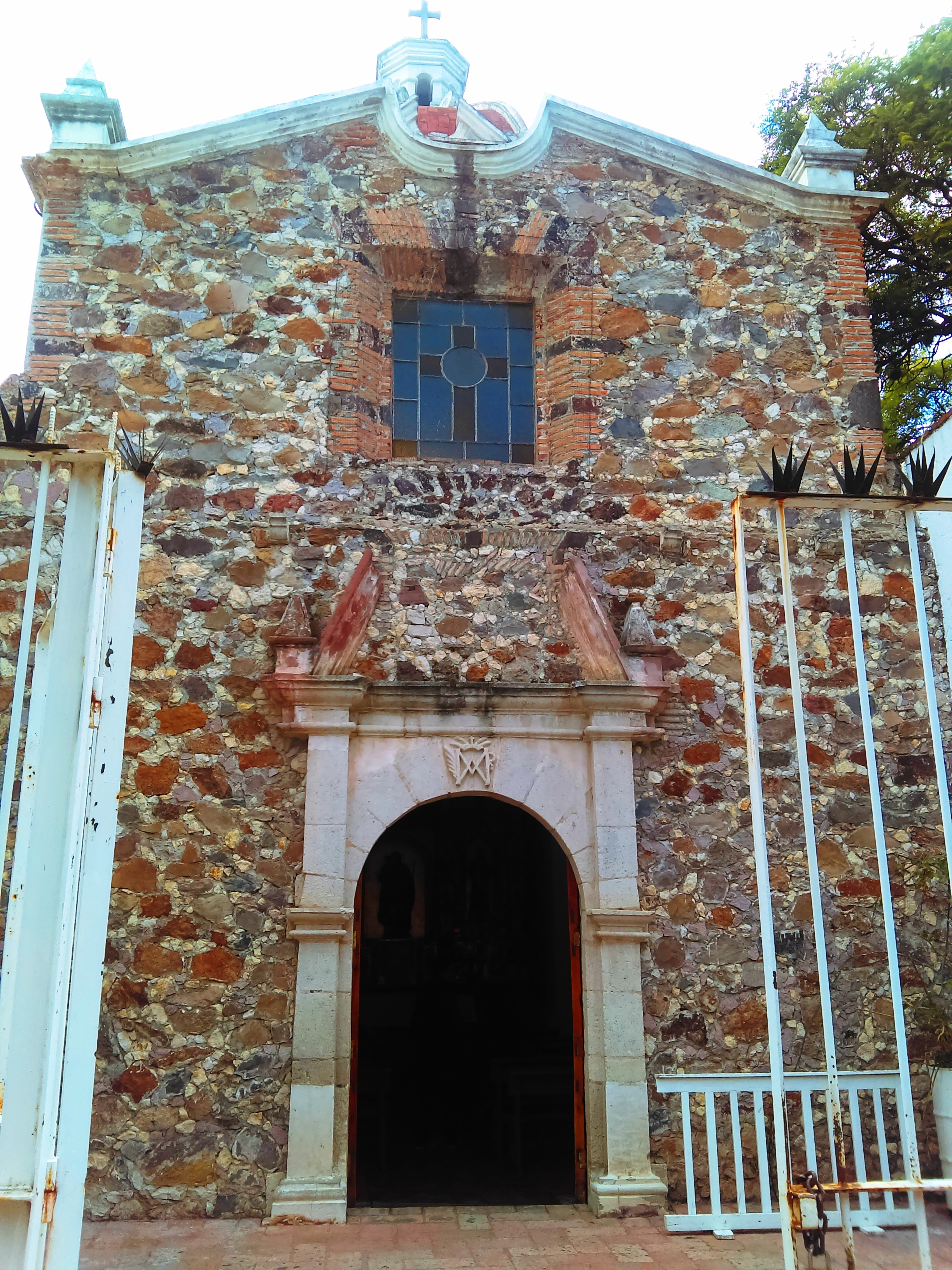 Capilla de Nuestra Señora de la Luz en Pachuca, México